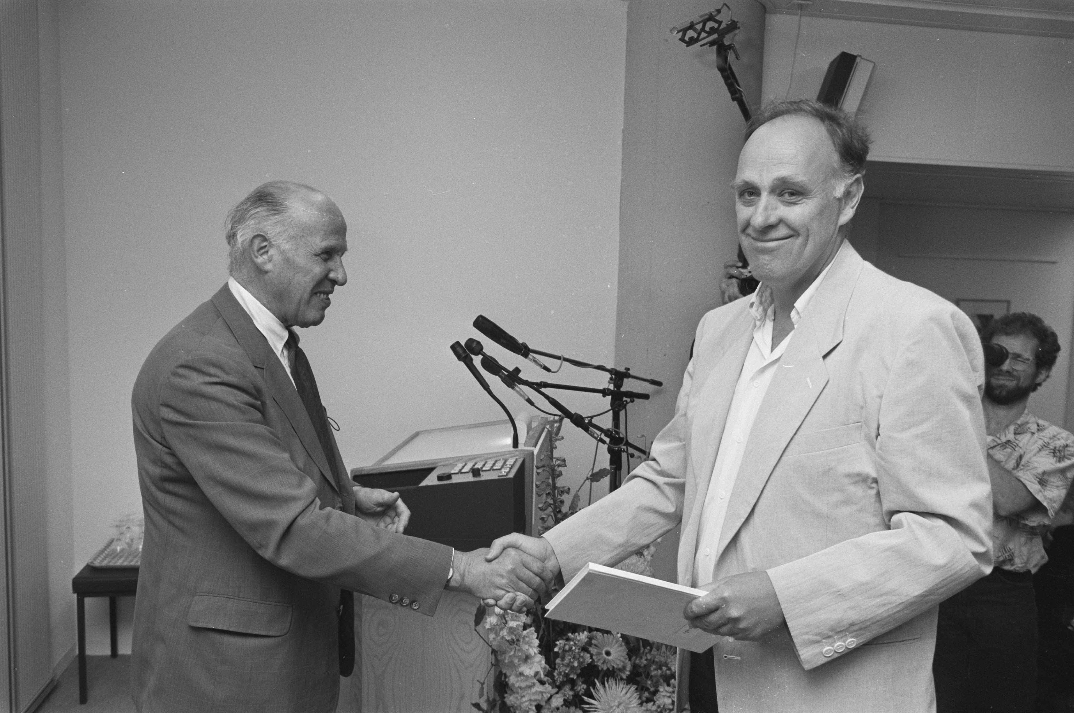 Collectie / Archief : Fotocollectie Anefo Reportage / Serie : [ onbekend ] Beschrijving : Hugo Brandt Corstius ontvangt PC Hooftprijs 1987 uit handen prof. Dresden (l) voorzitter Stichting PC Hooftprijs Datum : 3 juni 1988 Locatie : Den Haag, Zuid-Holland Trefwoorden : literatuur Persoonsnaam : Hugo Brandt Corstius, Prof. Dresden Instellingsnaam : P.C. Hooftprijs Fotograaf : Croes, Rob C. / Anefo Auteursrechthebbende : Nationaal Archief Materiaalsoort : Negatief (zwart/wit) Nummer archiefinventaris : bekijk toegang 2.24.01.05 Bestanddeelnummer : 934-2598